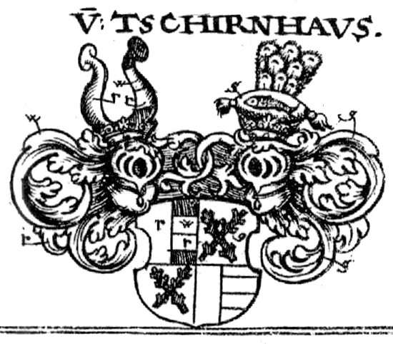 Wappen derer Freiherren von Tschirnhaus (Tschirnhaus und Lichtenburg (Berka v.Duba) vereinigt).